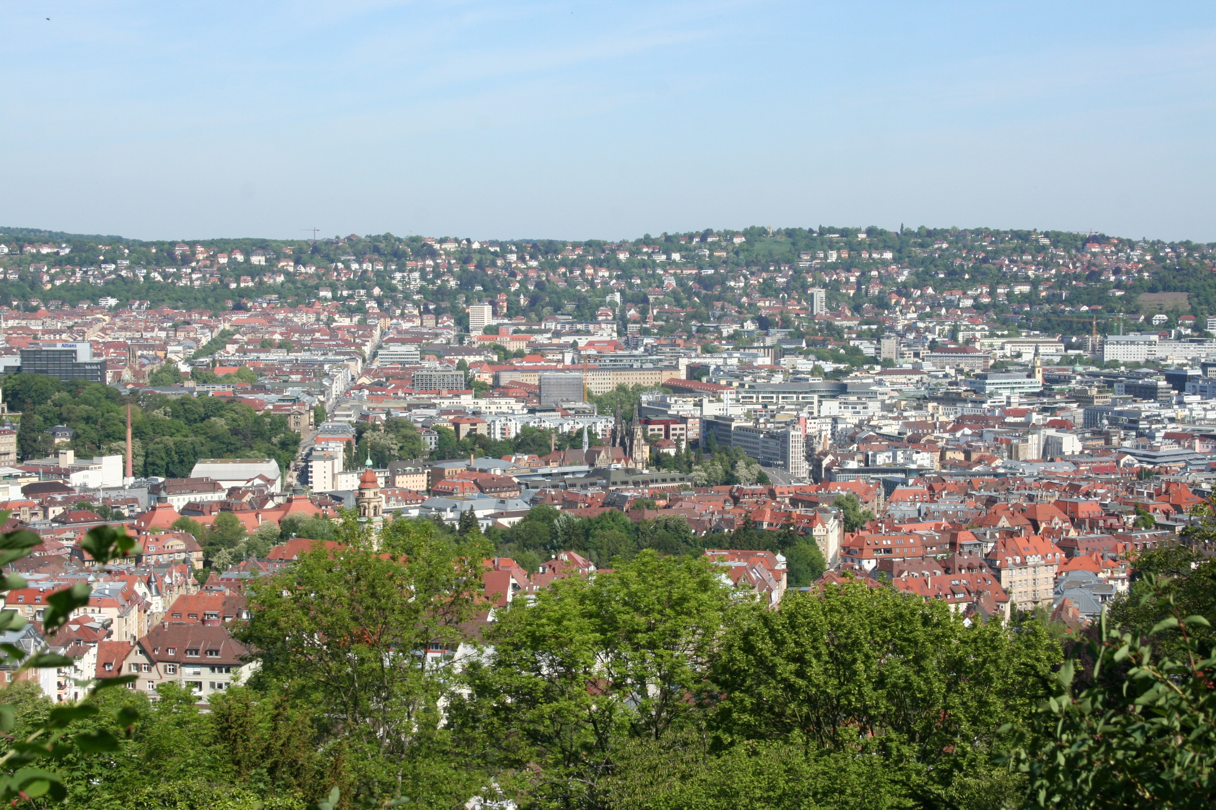 Vier Stuttgarter Stadtteile von der Neuen Weinsteige (Etzel-Denkmal) aus gesehen. Linke Hälfte vorne Stuttgart-Süd und hinten Stuttgart-West. Recht Hälfte vorne Stuttgart-Mitte und hinten Stuttgart-Nord (Killesberg).